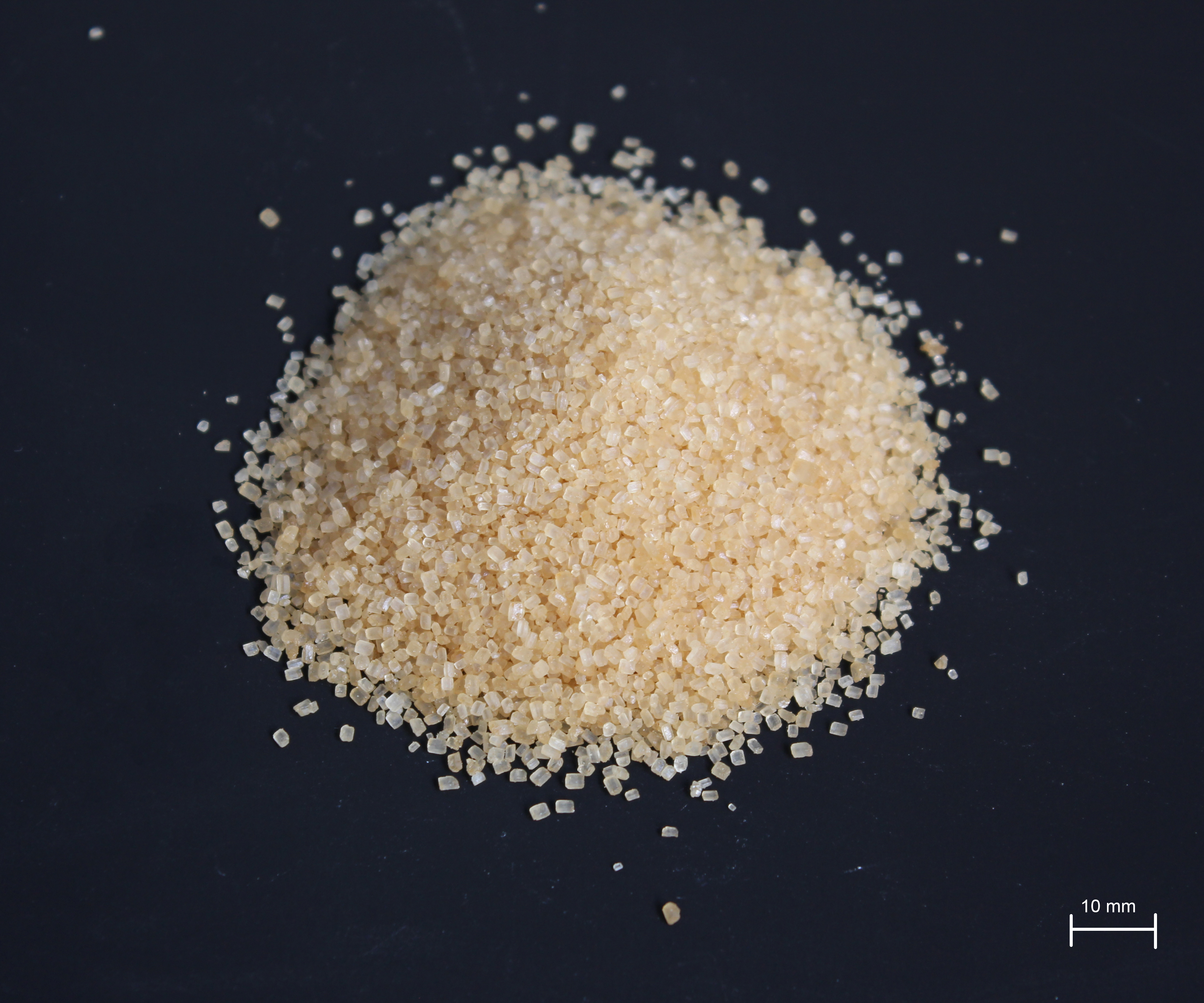 Photo von Brauner Zucker (feinkörnig) mit 1 Cent-Münze zum Größenvergleich.